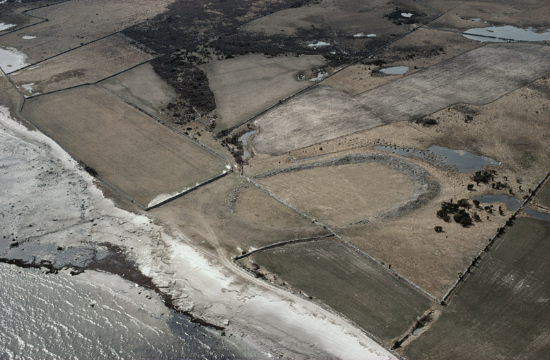 Bilden är tagen mot (väderstreck): S Motiv: Sandby 45:1 Nyckelord: Flygbilder, Riksintressen, Världsarv Kategori: Fornborg Bilden är tagen mot (väderstreck): S. Sandby 45:1.